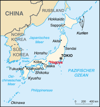 Karte von Japan mit Markierung der Stadt Nagoya